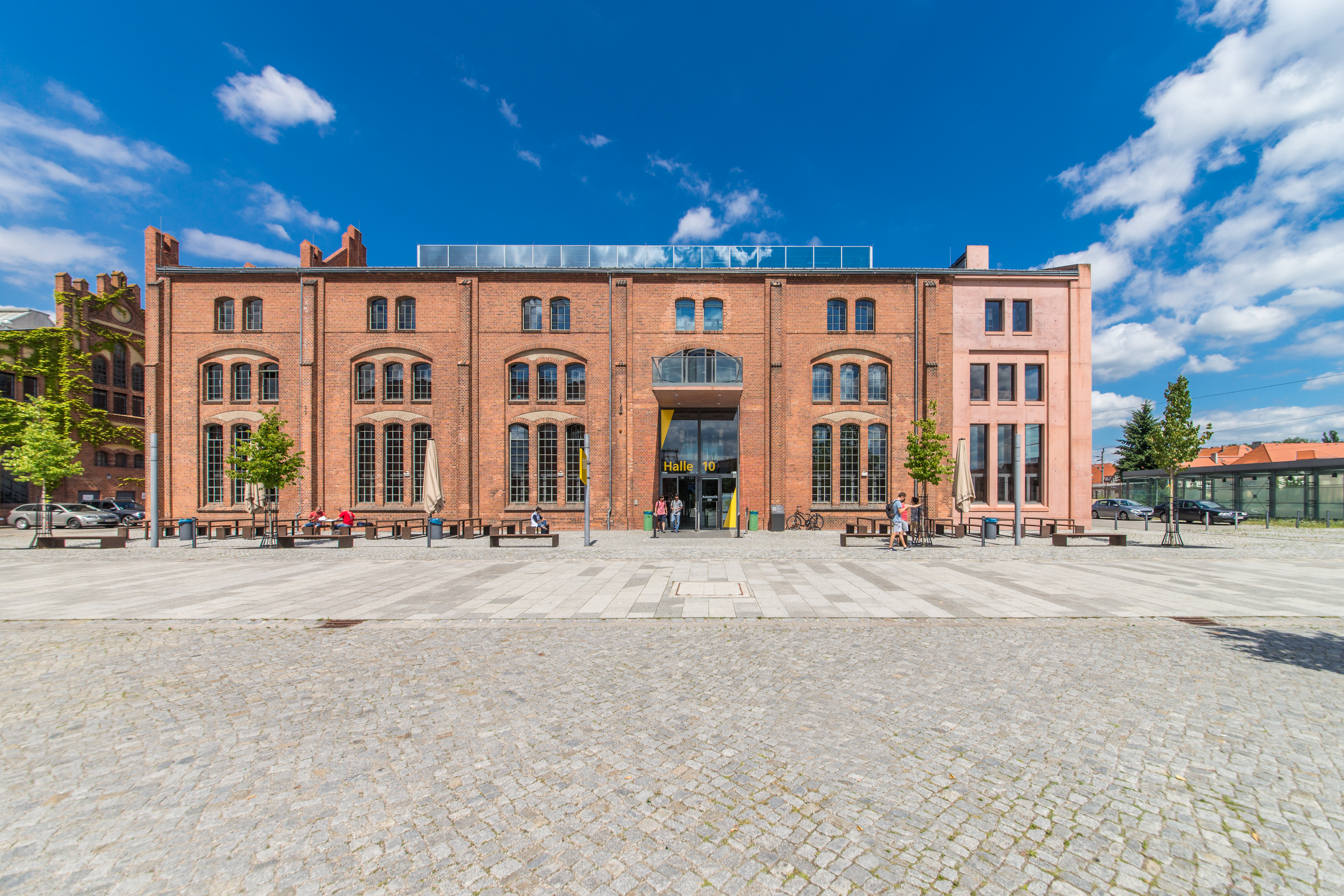 Fotograf: Matthias Friel